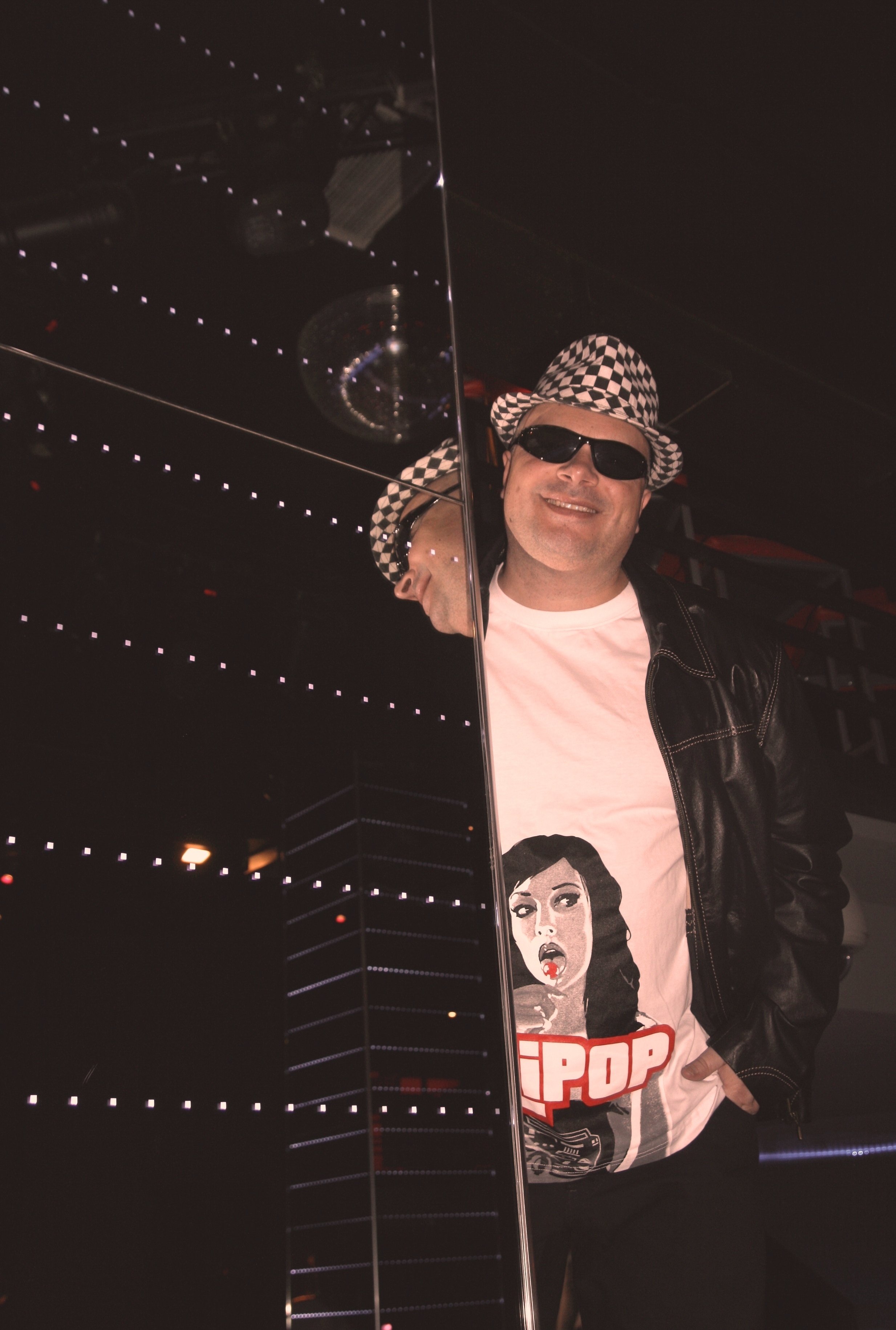 Krzysztof Skiba - sesja zdjęciowa